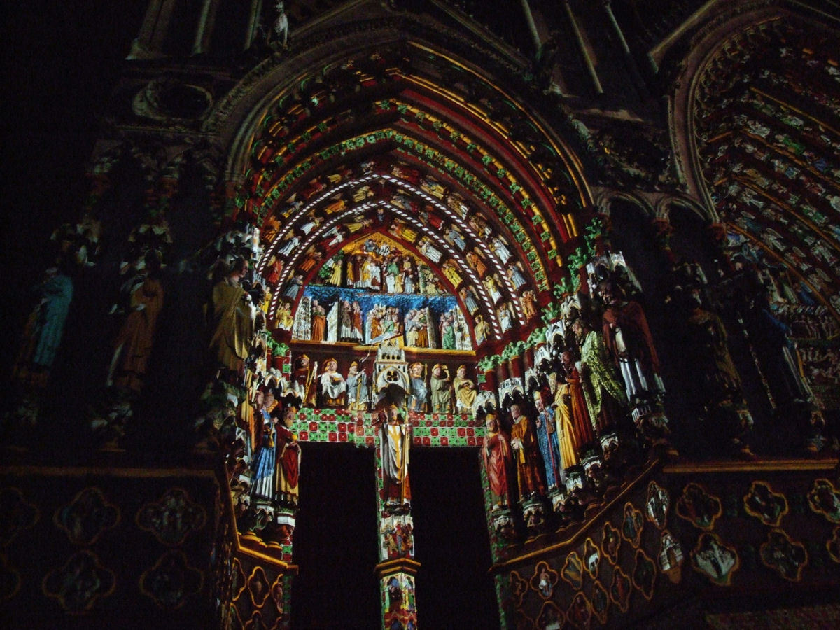 Amiens Cathedral (Cathédrale Notre-Dame d'Amiens), France - Son et lumière (July 2007)